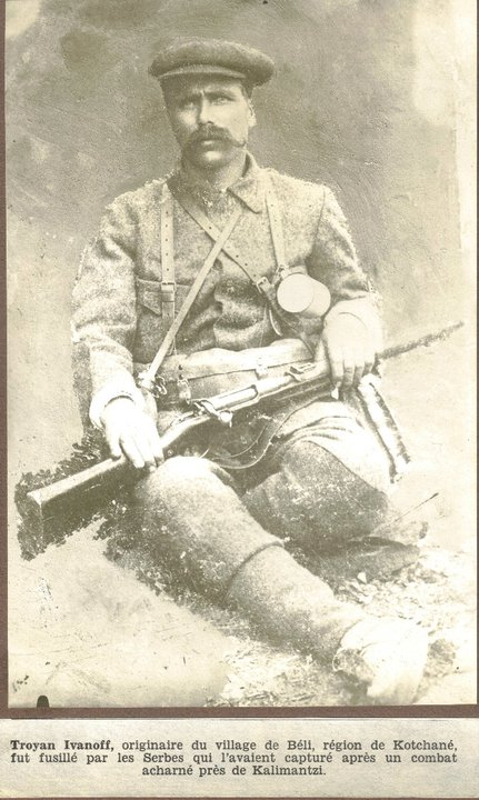 IMRO member Troyan Ivanov from Beli